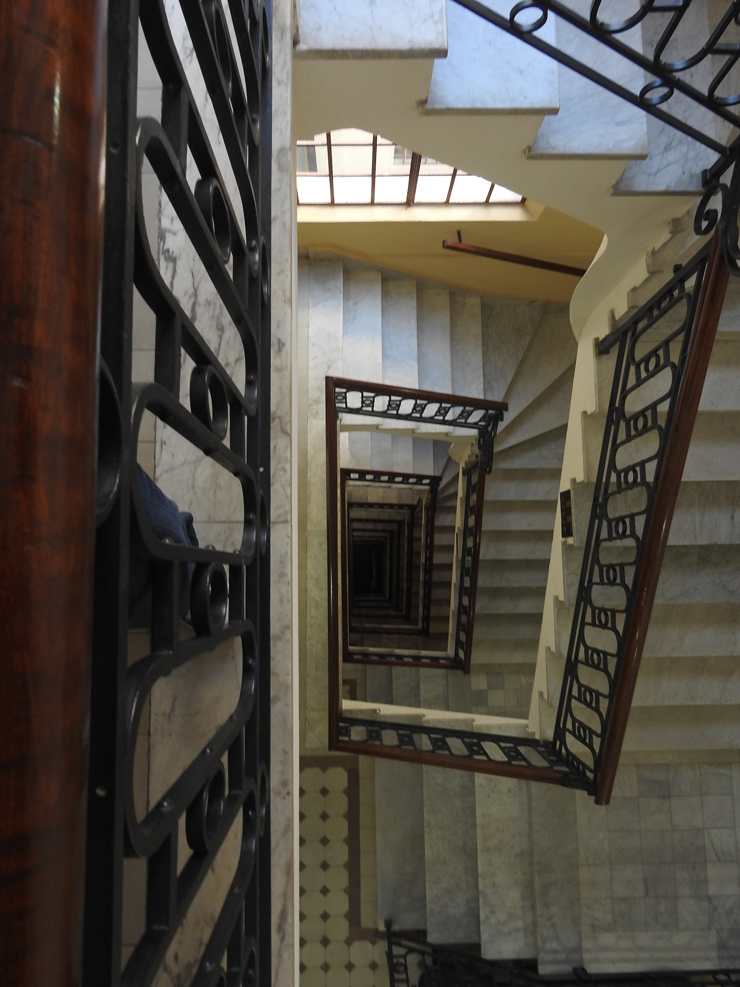 Fotos da porta de entrada, do saguão do térreo, de escadas, das portas dos elevadores e do terraço. Cultural property Sampaio Moreira Building, São Paulo (city), São Paulo (state), Brazil Q10270258, P727